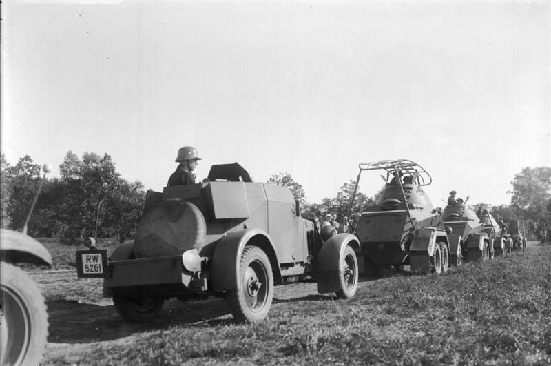 Manöver des VI. Armeekorps in der Lüneburger Heide vom 2. bis 7. September 1935, Panzerspähwagen Information added by Wikimedia users.Spähpanzer, im Vordergrund Pz-Spw. (4 Rad) Sd.Kfz. 222, davor Pz-Spw. (6 Rad) (Fu) (Sd.Kfz. 232), davor Pz.Spw. (6 Rad) (Sd.Kfz. 231)